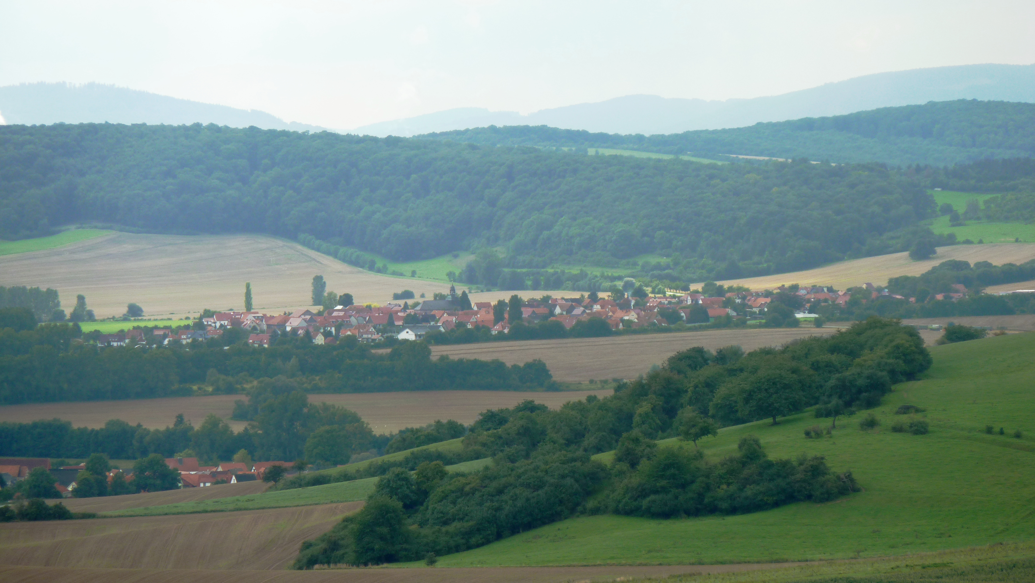 Blick von Nordosten vom Uhlenkopf auf Hohengandern, Landkreis Eichsfeld (dahinter des Waldgebiet des "Alten Holzes" li und der "Stürzliede" re)